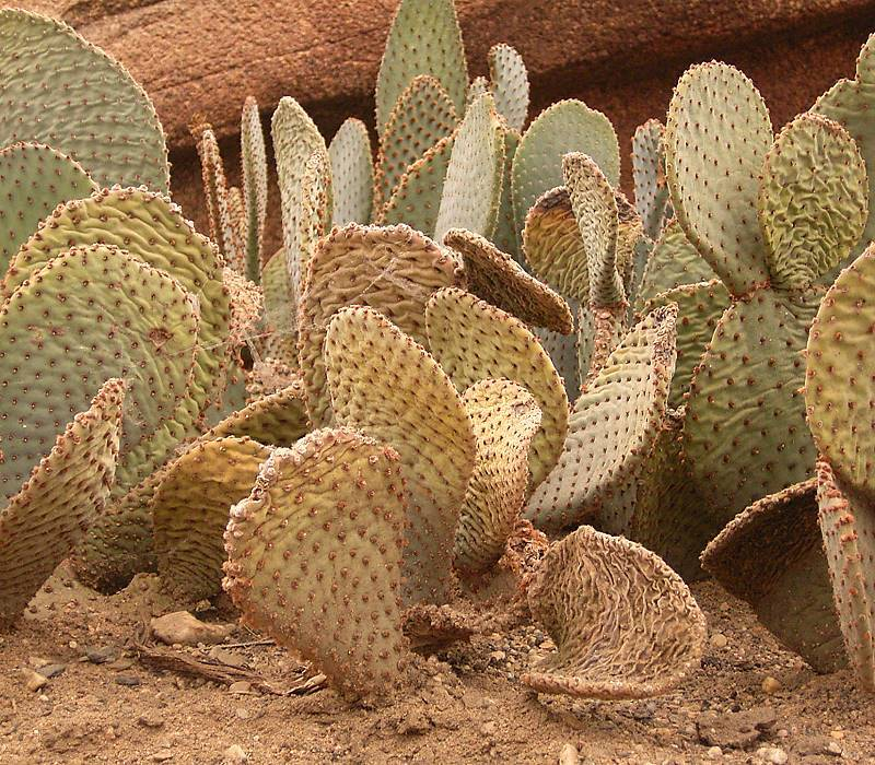 Burgers Zoo, NL